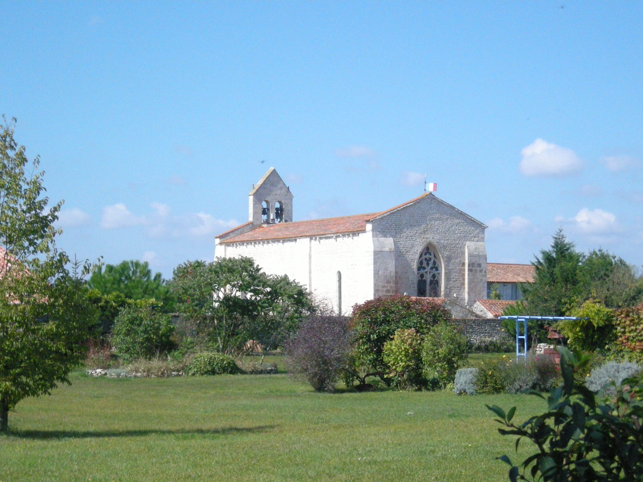 Église du XIIème siècle. .